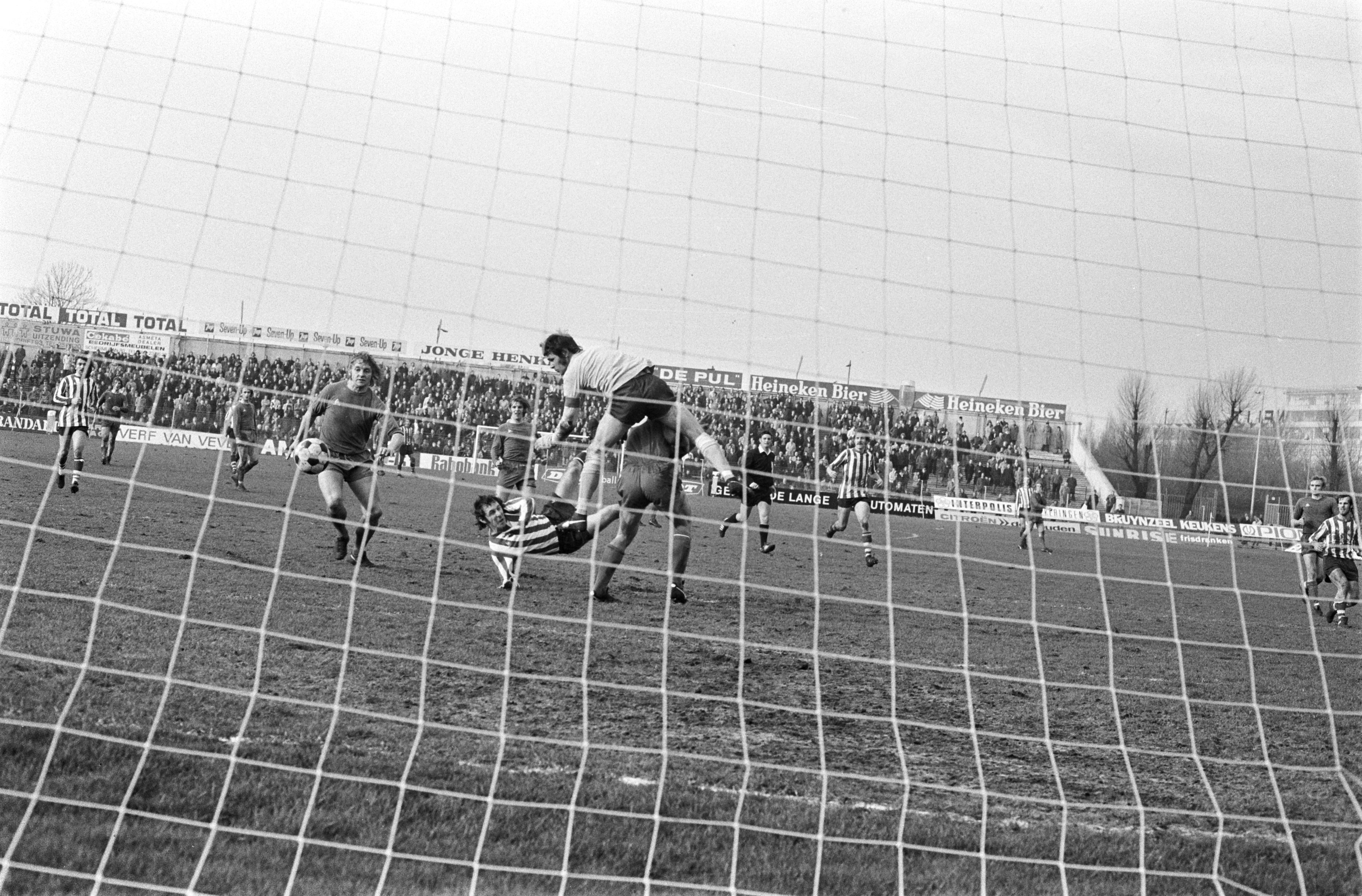 Collectie / Archief : Fotocollectie Anefo Reportage / Serie : Sparta tegen Amsterdam 1-0 Beschrijving : Keeper Jongbloed in actie, links Fransz en midden Kowalik Datum : 10 februari 1974 Locatie : Rotterdam, Zuid-Holland Trefwoorden : sport, voetbal Persoonsnaam : Jongbloed, Jan, Kowalik, Janusz Fotograaf : Fotograaf Onbekend / Anefo Auteursrechthebbende : Nationaal Archief Materiaalsoort : Negatief (zwart/wit) Nummer archiefinventaris : bekijk toegang 2.24.01.05 Bestanddeelnummer : 926-9947